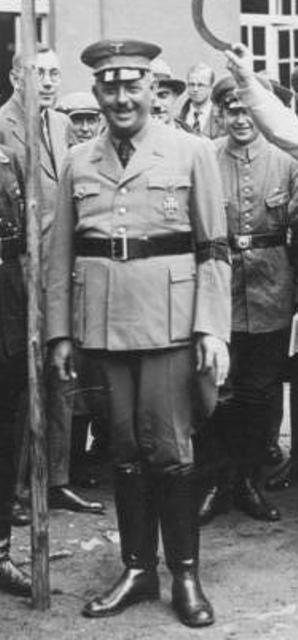 Der preußische Justizminister Kerrl besucht das Referendarlager in Jüterbog! Der preußische Justizminister Kerrl im Referendarlager bei der Besichtigung des Galgens mit dem darauf aufgehangenen Paragraphen. Links neben ihm der Lagerleiter Oberstaatsanwalt Spieler und Sturmfüherr Heesch.